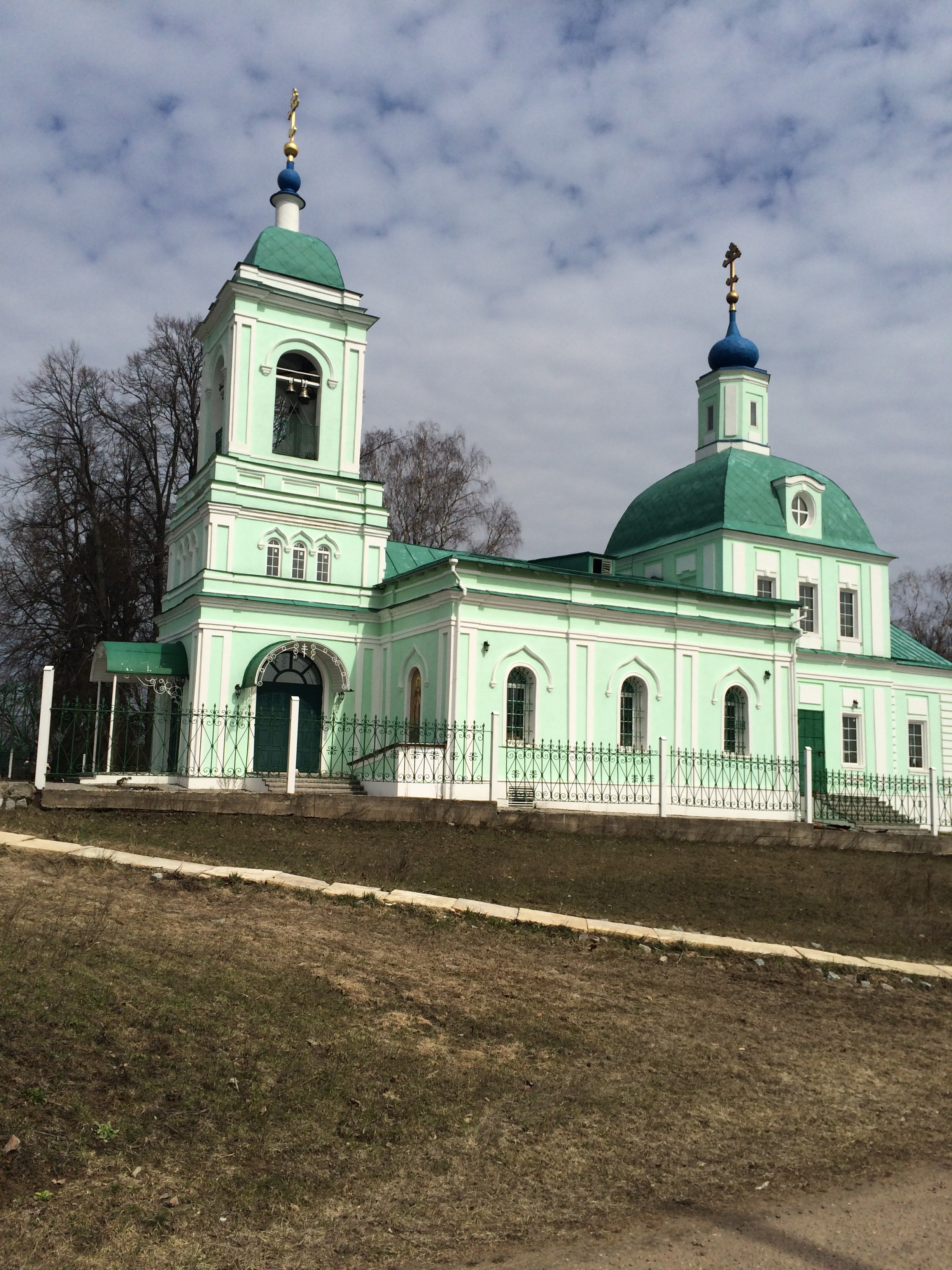 Троицкая церковь, Рязанцы, Щелковский район